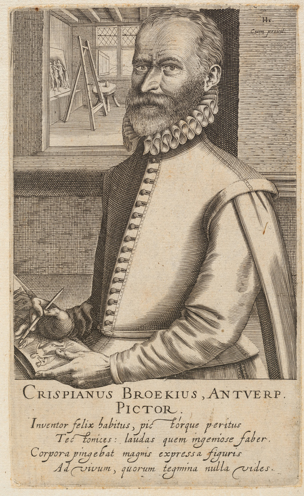 Crispin_van_den_Broeck, Flamish Painter an engaver